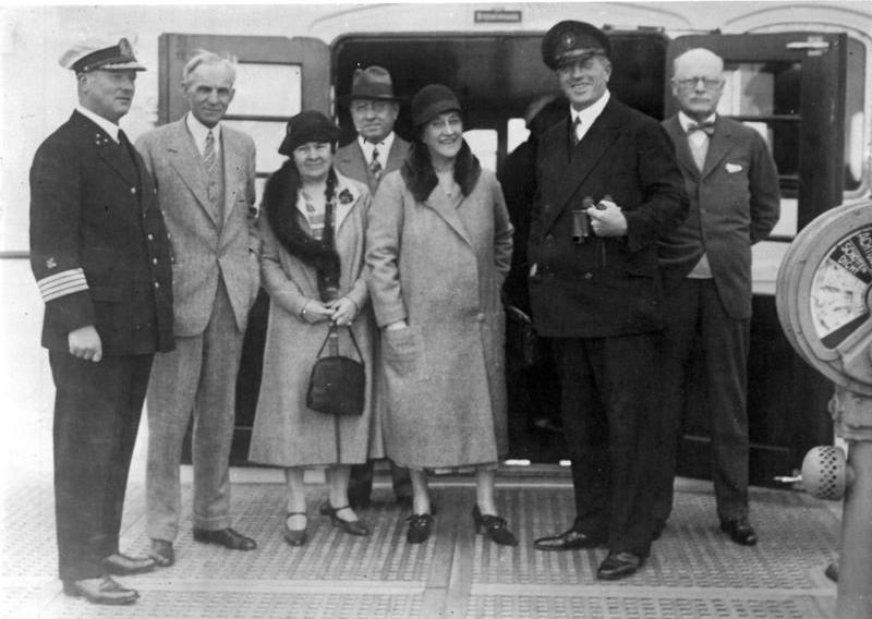 Henry Ford, der amerikanische Multimillionär in Deutschland eingetroffen! v.li.nach re.: Kapitän Ziegenbein, Führer der Bremen, / Henry Ford / Mrs. Ford, der Sekretär Ford´s Mr. Giehsed,/ Mrs. Hadges / Graf Luckner/ Mr. Hadges